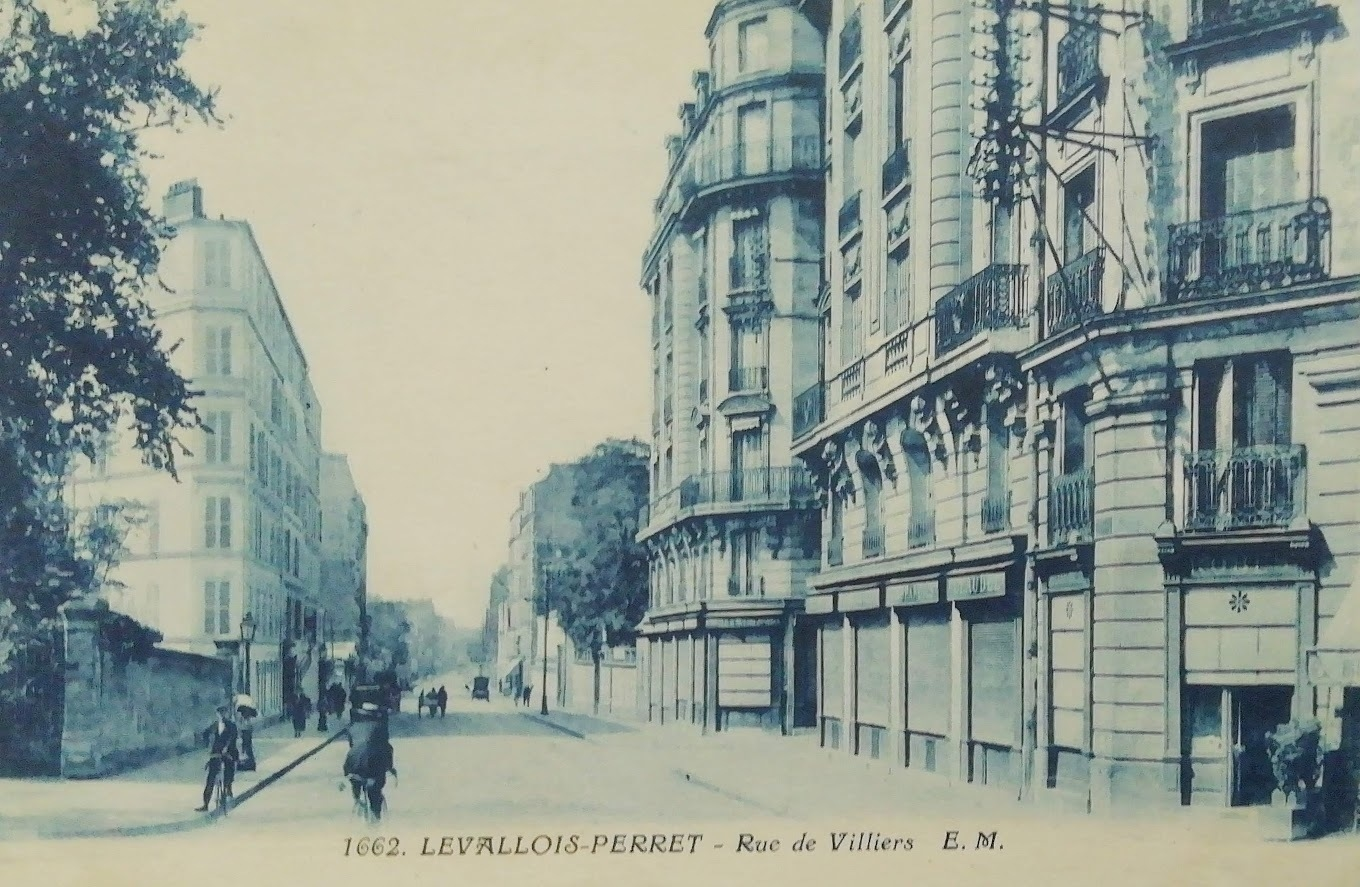 Levallois-Perret. Rue de Villiers, le trottoir de gauche fait partie de Neuilly-sur-Seine.